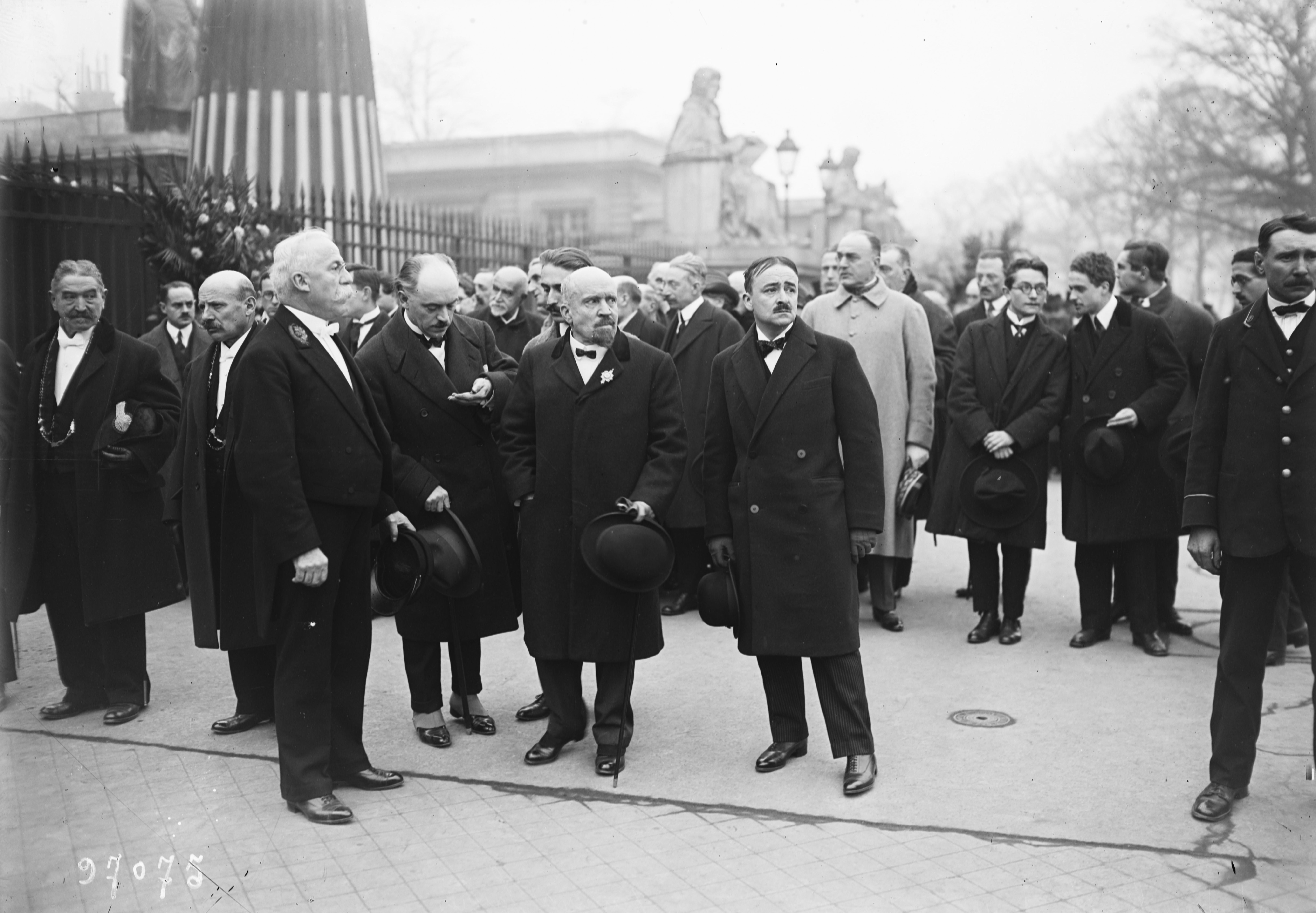 23/11/24, transfert des cendres de Jaurès au Panthéon, amiral Jaurès [au centre]